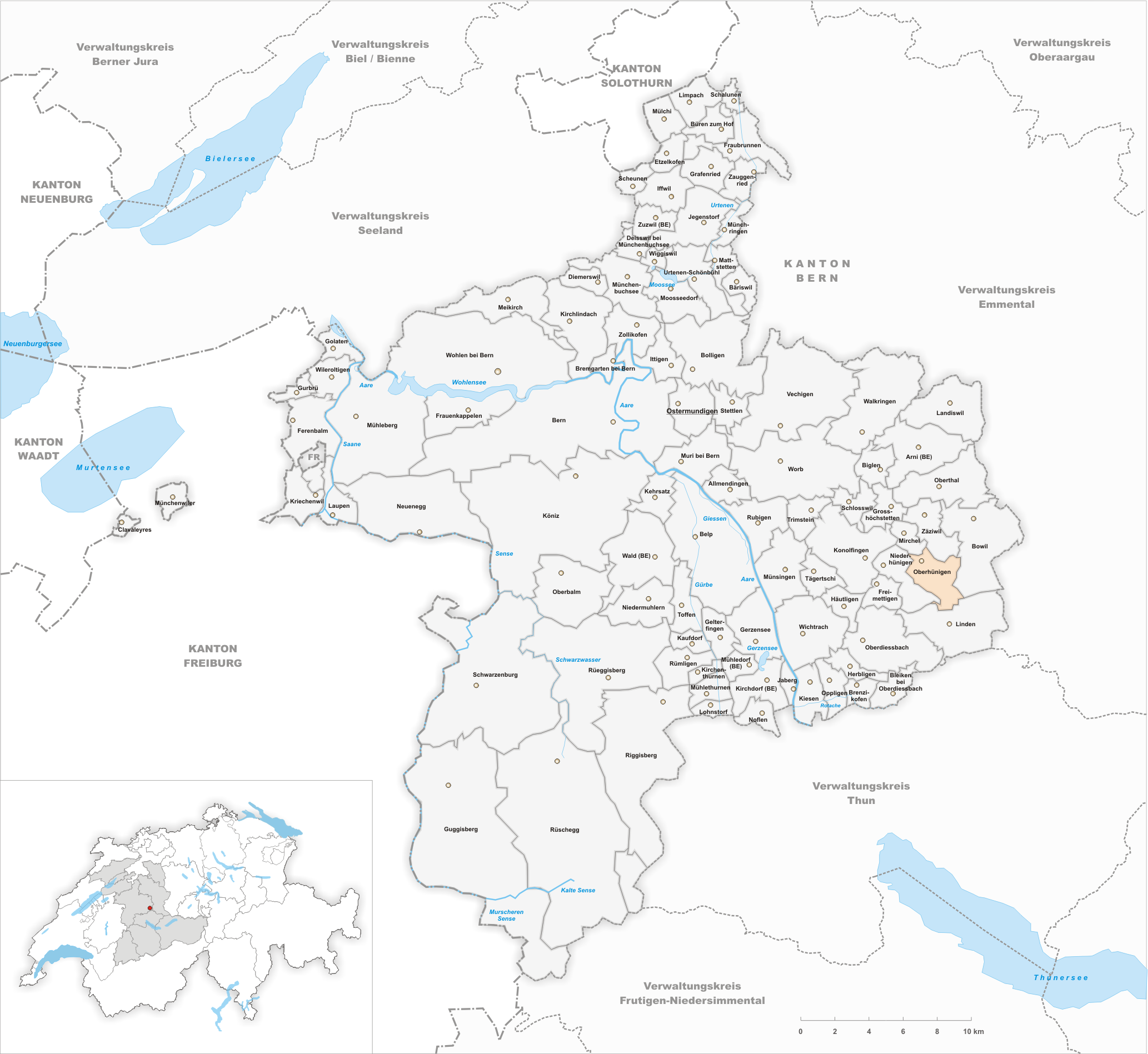 Municipality Oberhünigen